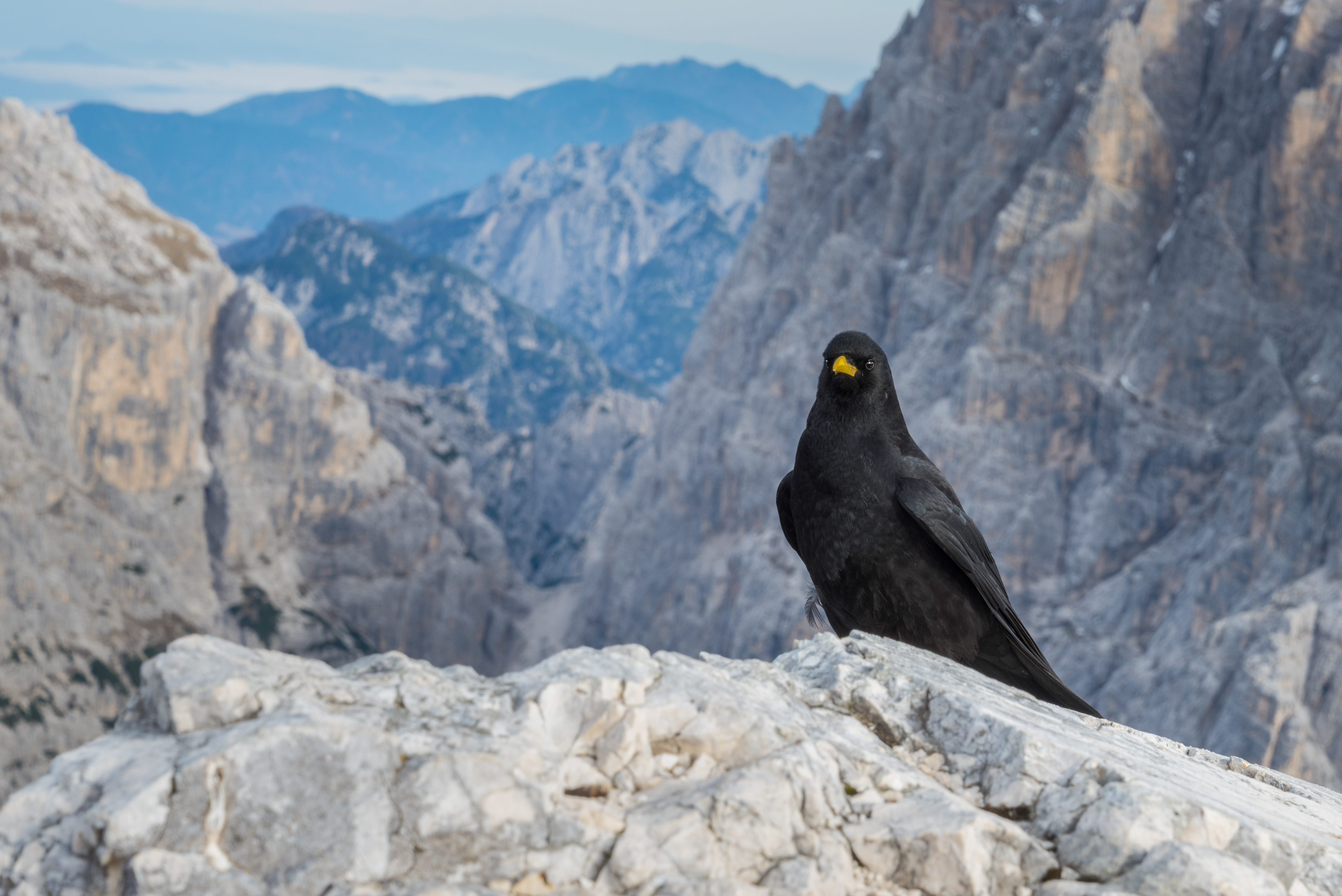 Alpi Giulie, cima di Terrarossa